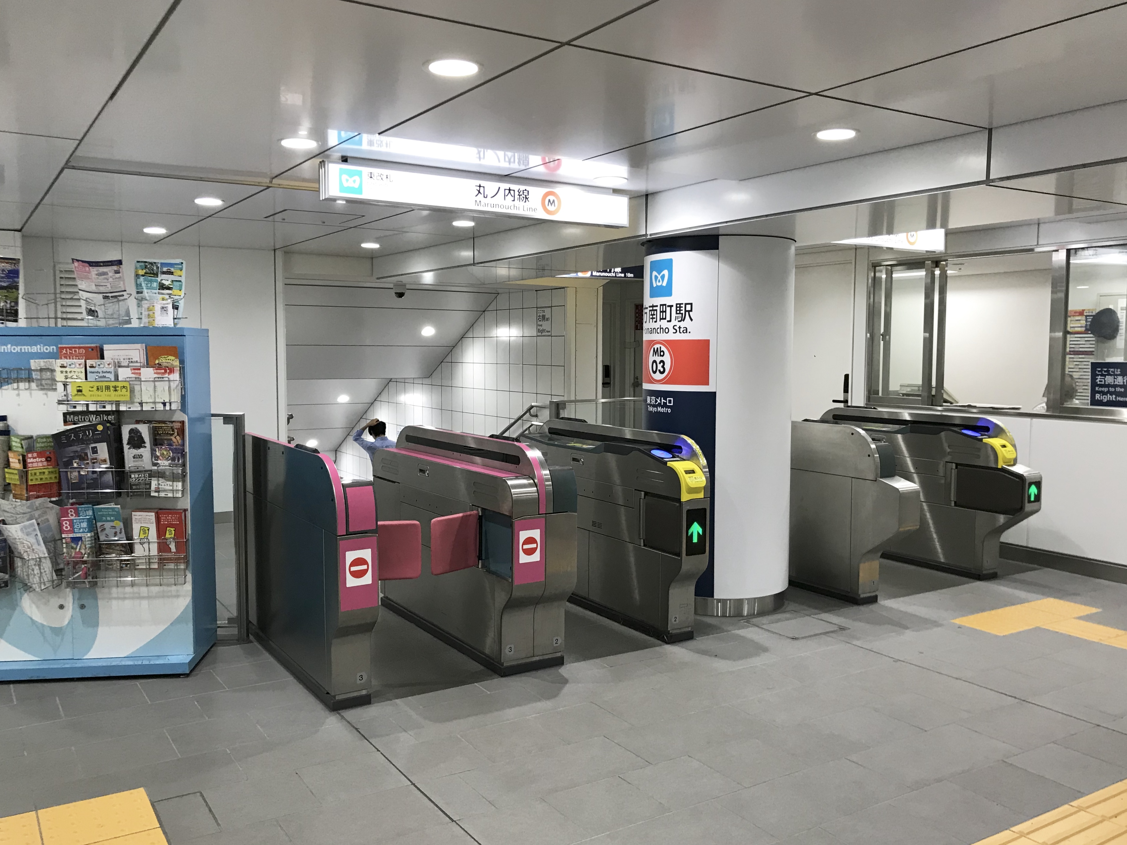 東京メトロ丸ノ内線東改札口